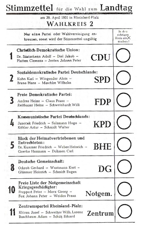 Stimmzettel zur Landtagswahl in Rheinland-Pfalz 1951, Wahlkreis 2